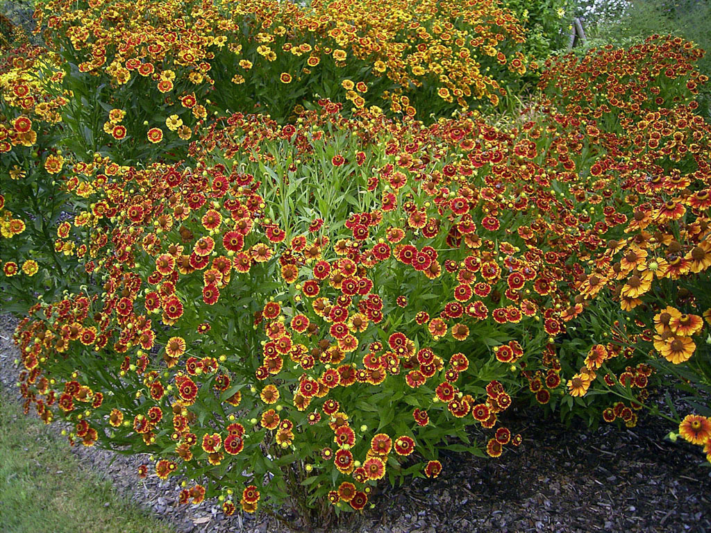 Blüten der Helenium_Hybride 'Fiesta'